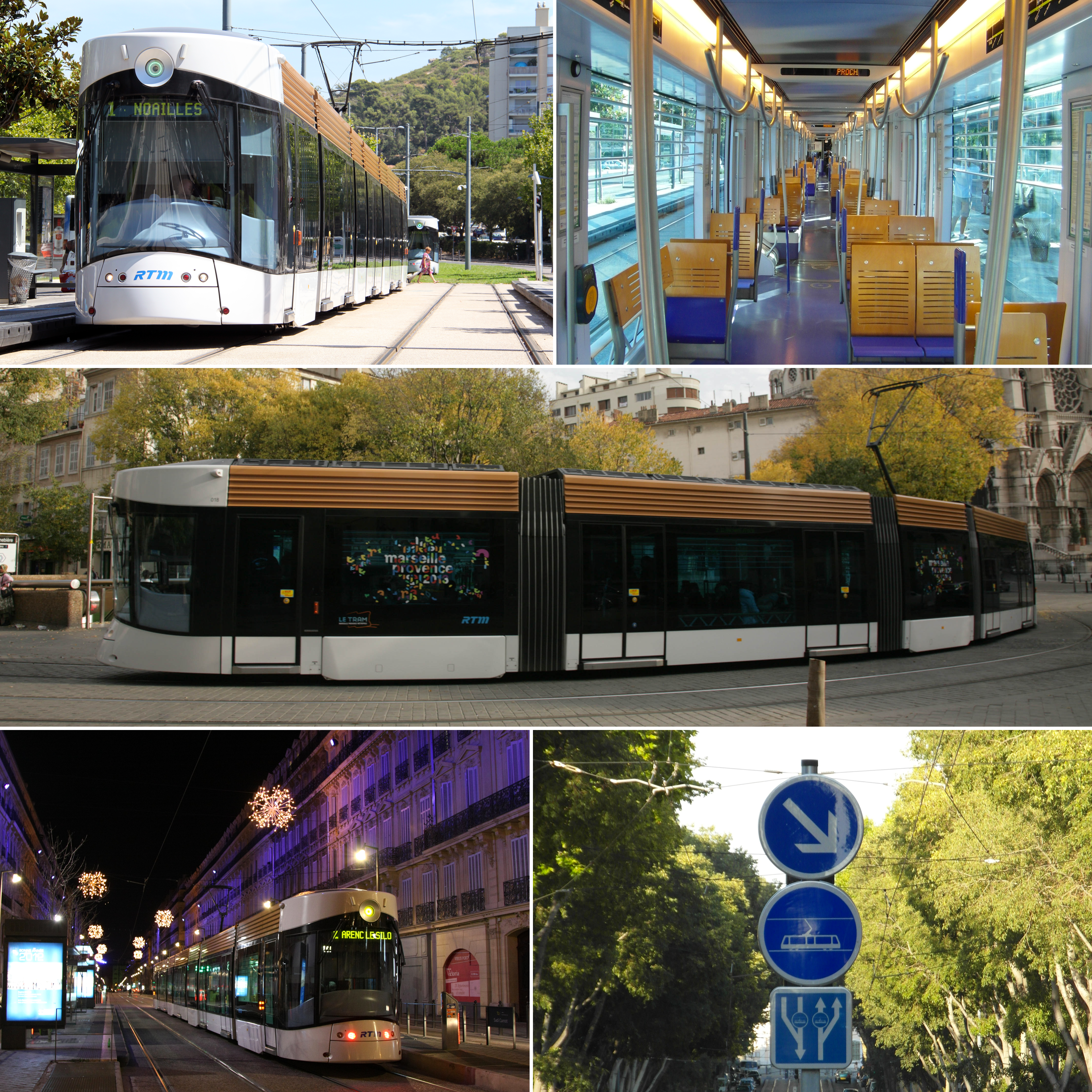 Mosaïque de photos du métro de Marseille. En haut à gauche : une rame à l'arrêt Les Caillols En haut à droite : Intérieur d'une rame Centre : une rame arrivant à l'arrêt Réformés-Canebière En bas à gauche : un tramway à l'arrêt Sadi Carnot En bas à droite : panneaux indiquant le début des voix réservées aux tramways sur le boulevard Chave